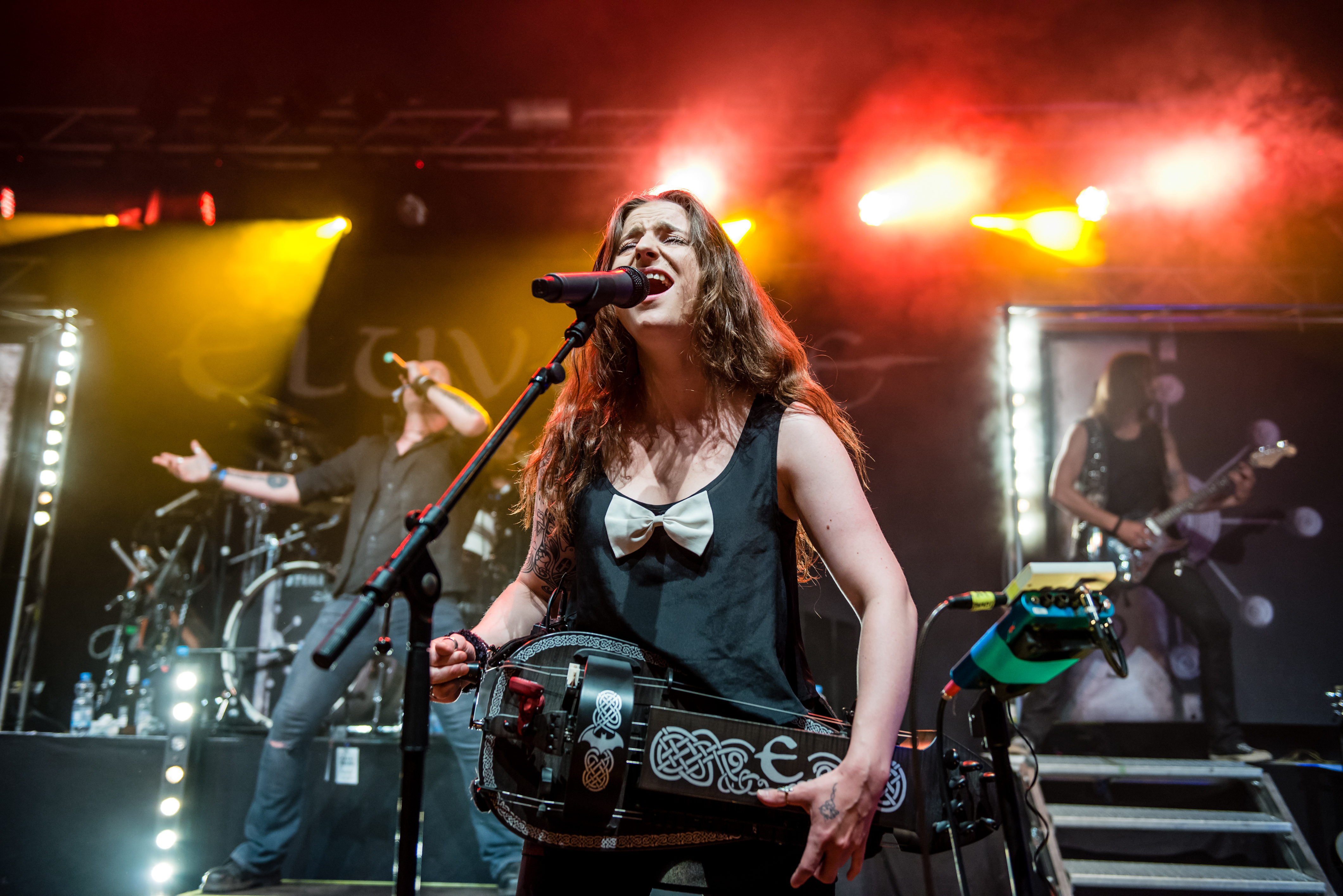 'Dong Open Air 2015; Neukirchen-Vluyn Halde Norddeutschland': 'Eluveitie'